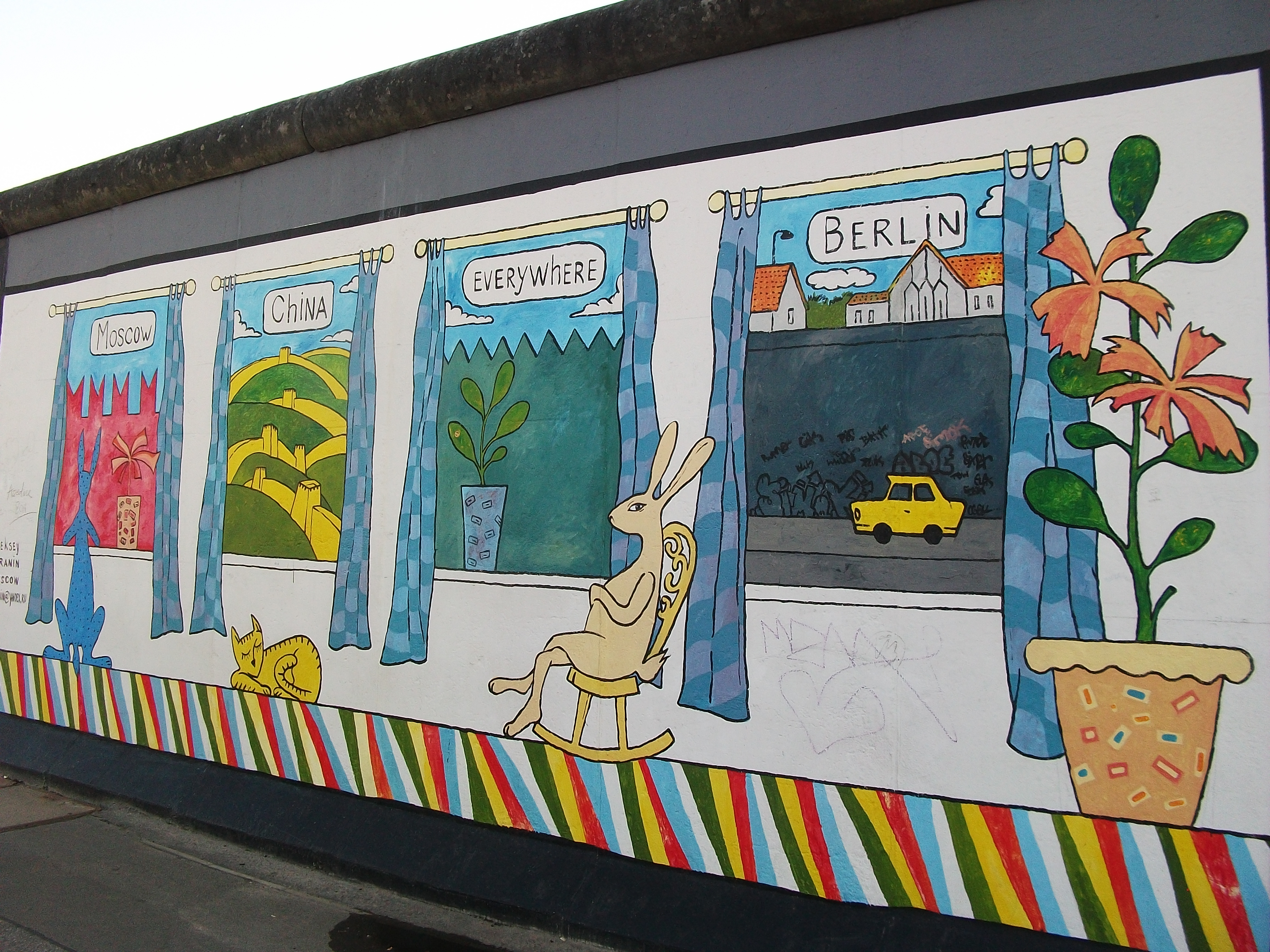 Bývalá Berlínská zeď, dnes East Side Gallery